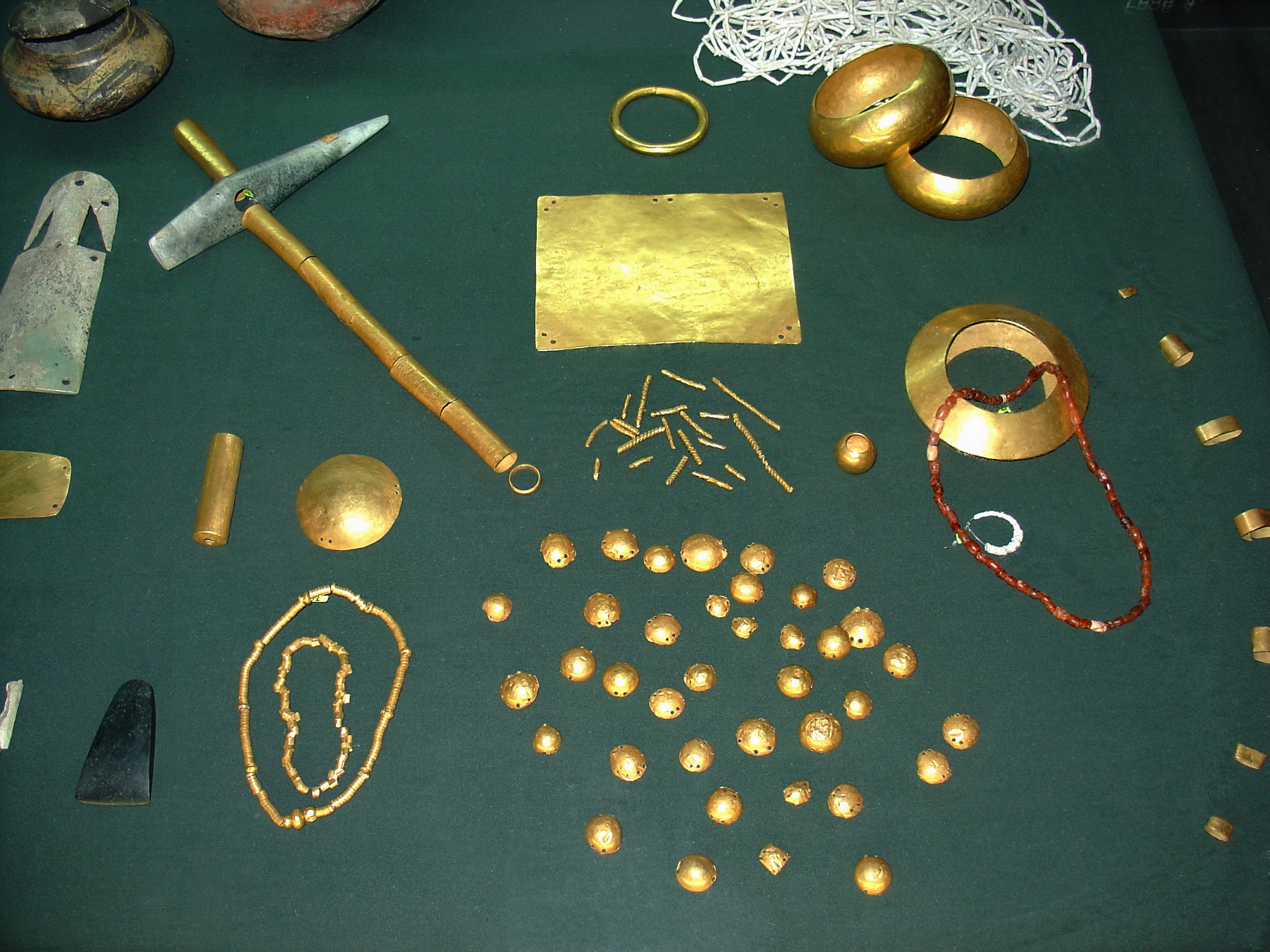 Bijoux exposés au musée archéologique de Varna (Bulgarie) et qui sont les plus vieux objets en or connus à ce jour (-4600 avant J.C)